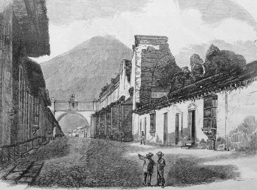 Arco de Santa Catalina en 1865.